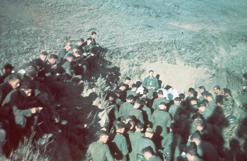 Feldgottesdienst vor Stalingrad August 1942